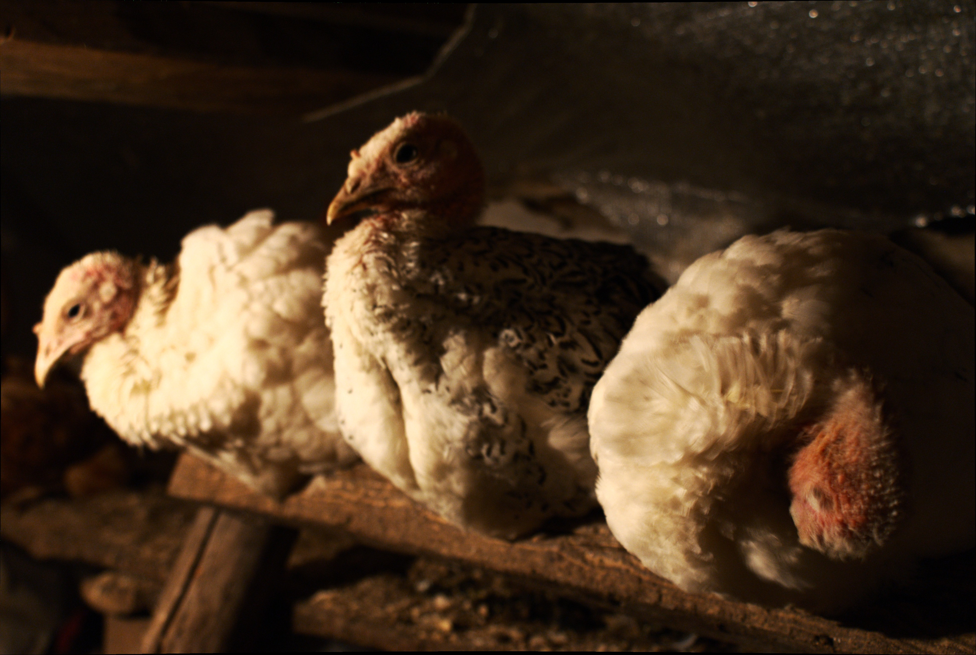 Индюшата ночуют в помещении (возраст 3 месяца).